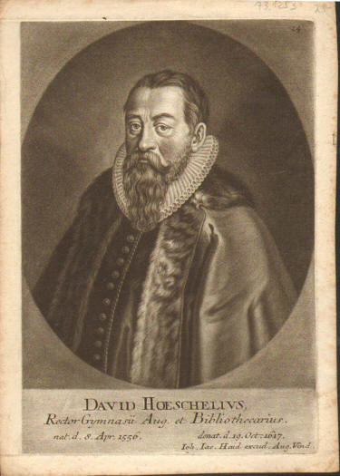 David Höschel; Schabkunstblatt von Johann Jacob Haid, ca. 1747